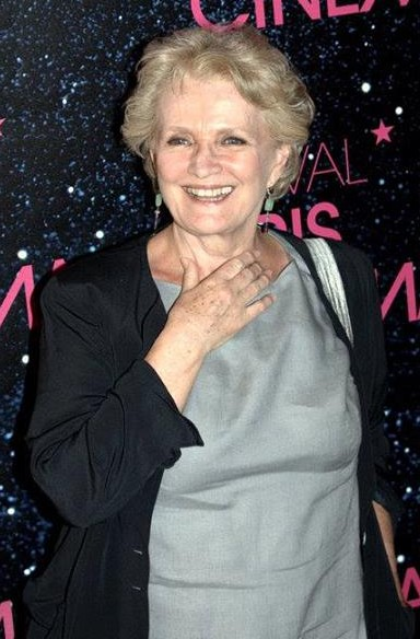 Marie-Christine Barraut à l'avant-première du film "Le Grand méchant loup".